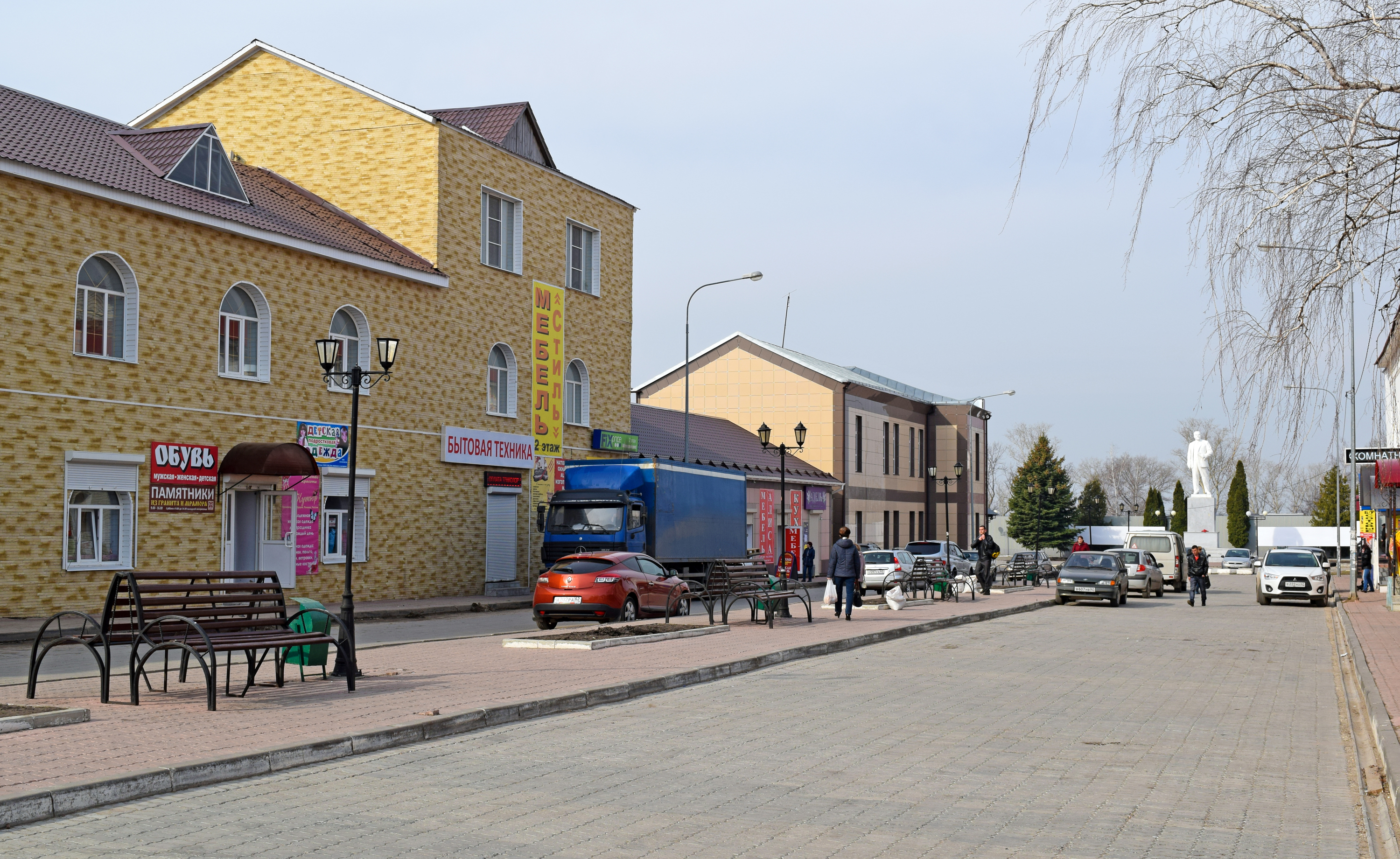 Центральная часть г.Скопина, Рязанская область